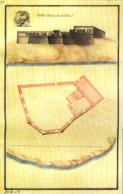 "Forte das Cavallas", s/d, autor desconhecido, Arquivo Histórico Militar, Lisboa. in MARTINS, José Salgado, "Património Edificado da Ilha Terceira: o Passado e o Presente". Separata da "Atlântida", vol. LII, 2007. p. 31. Também integrante da "Colecção de Plantas e Alçados de 32 Fortalezas dos Açores, por Joze Rodrigo d'Almeida em 1830", José Rodrigo de Almeida, 1830 (c.) GEAEM (346-1-8A-96), Lisboa, Portugal.